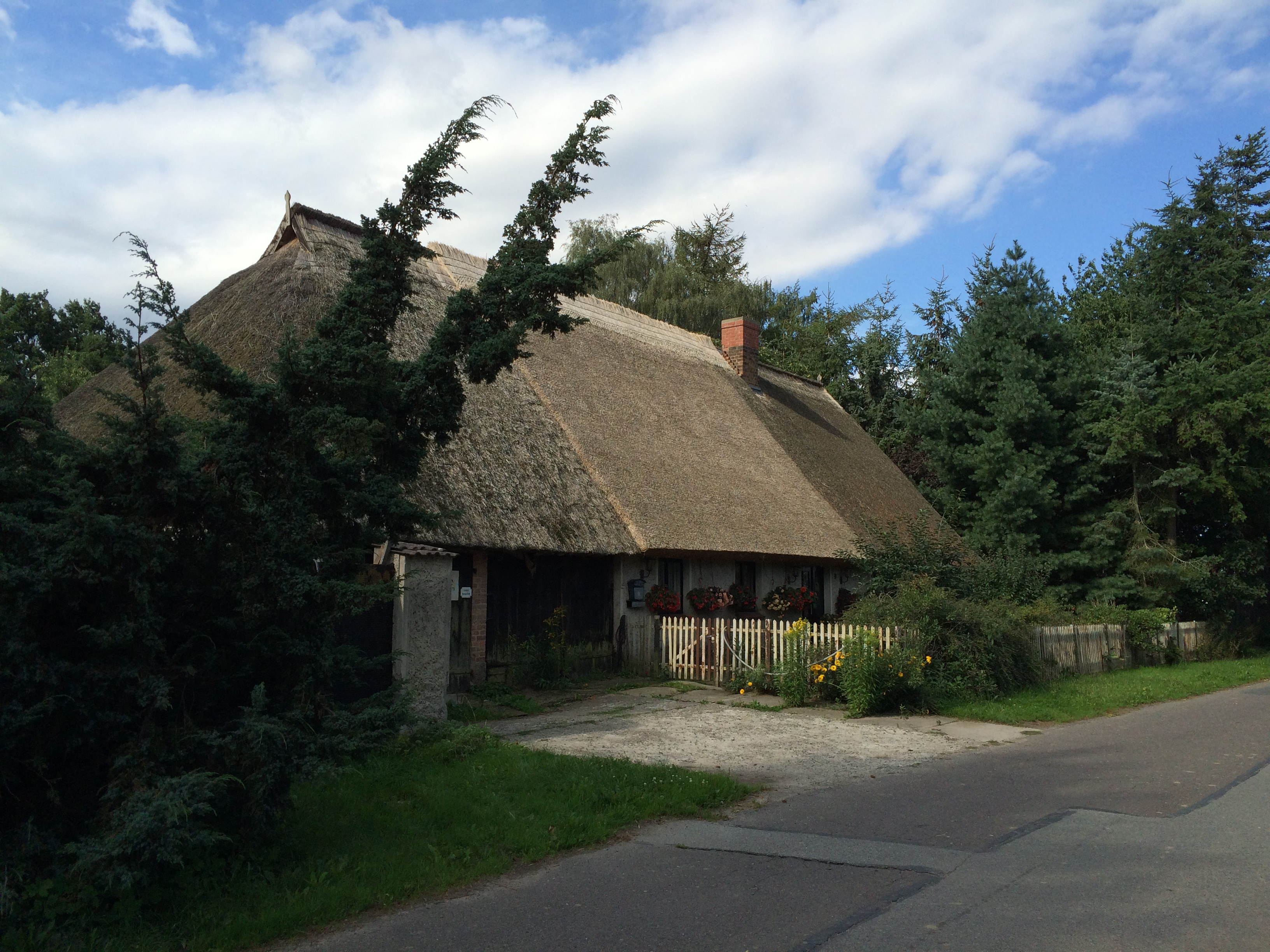 Neu Ungnade in Hinrichshagen, einer Gemeinde im Landkreis Vorpommern-Greifswald, Mecklenburg-Vorpommern